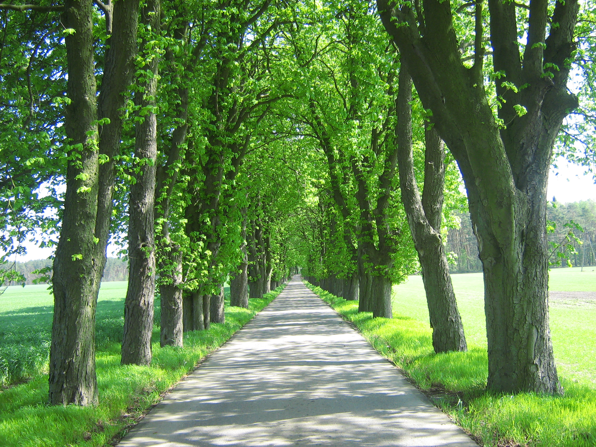 Aleja kasztanowców w Łuskowie